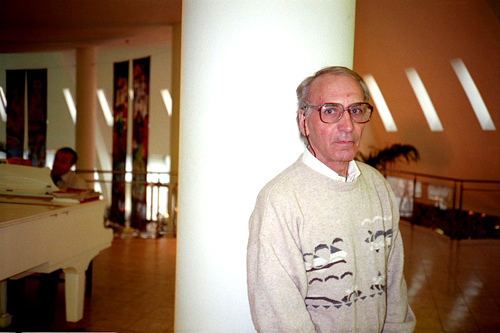 портрет Владимира Сёмина.